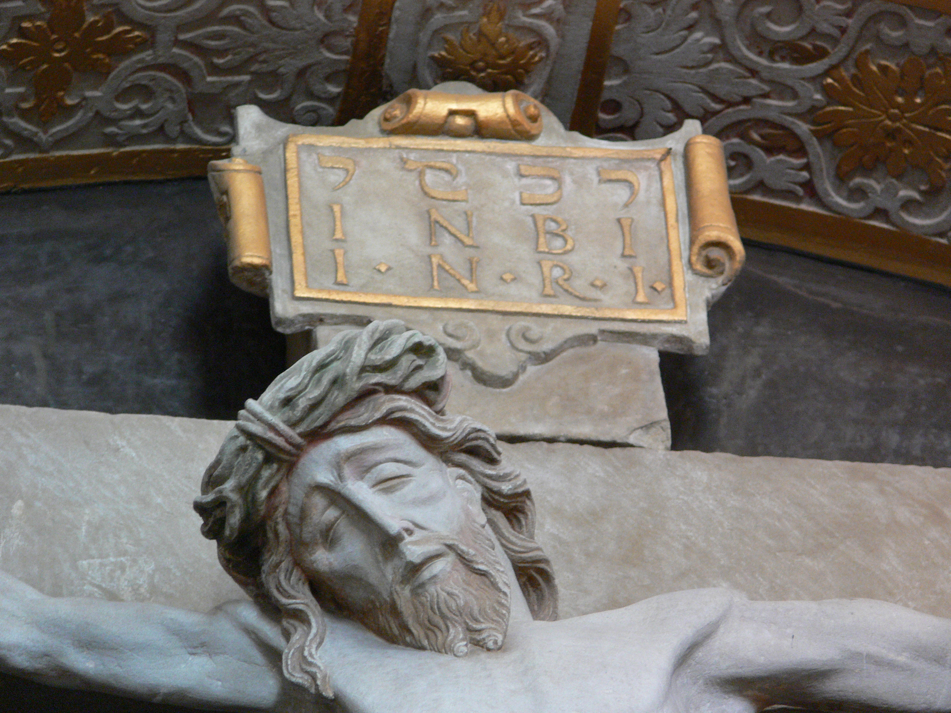 Westvorhalle der Stiftsbasilika St. Vitus, Ellwangen (Jagst) Kreuzaltar, Hans und Matthäus Schamm (Ottobeuren) zugeschrieben, um 1610; detail: Christushaupt und INRI